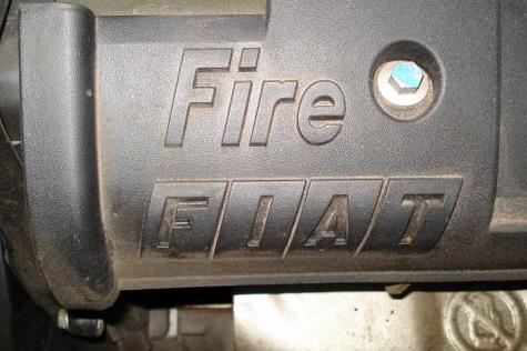 Motor FIRE de Fiat